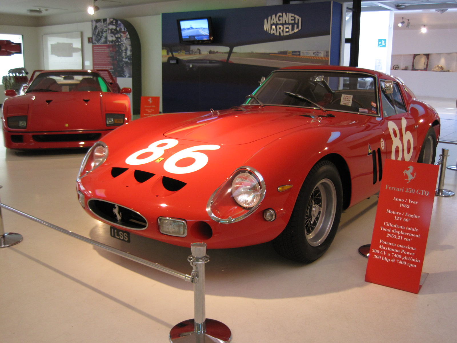 Automobiles in the Galleria Ferrari - Ferrari 250 GTO - V12 - 1962